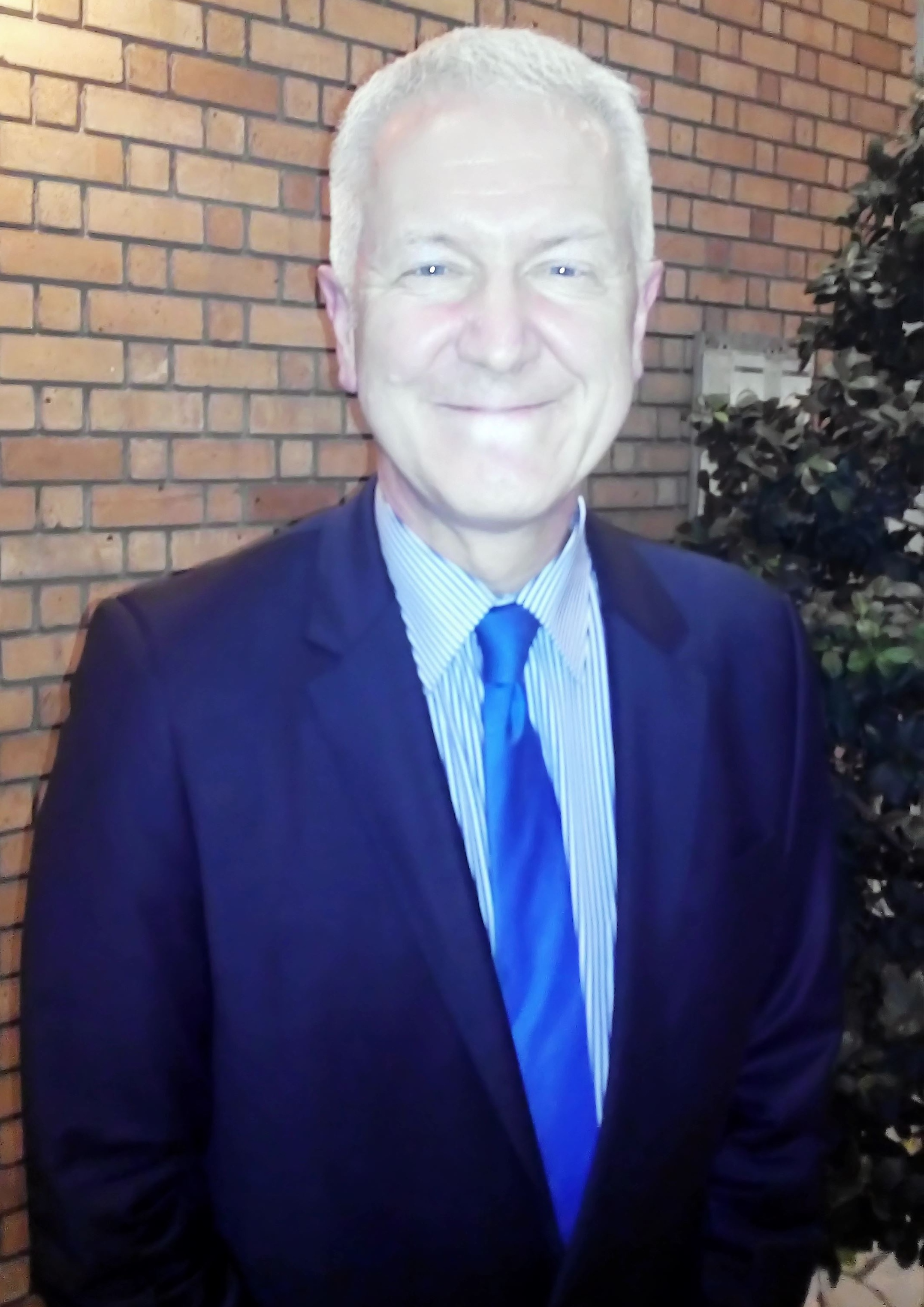 Ivo Sieber (2018)